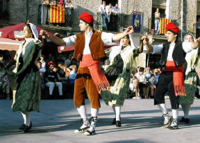 Els balladors i balladores de la dansa.